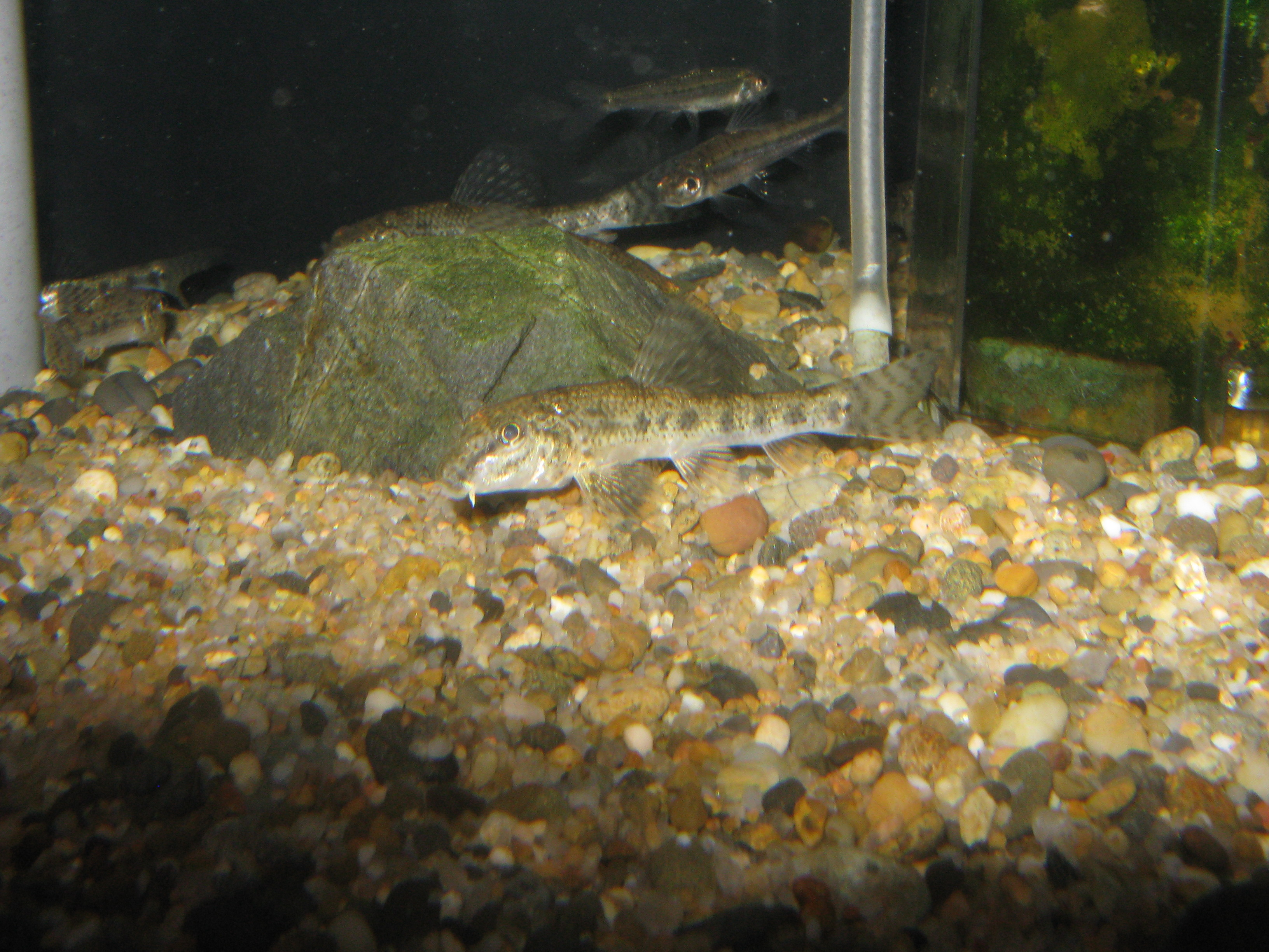 Scientific name Abbottina rivularis